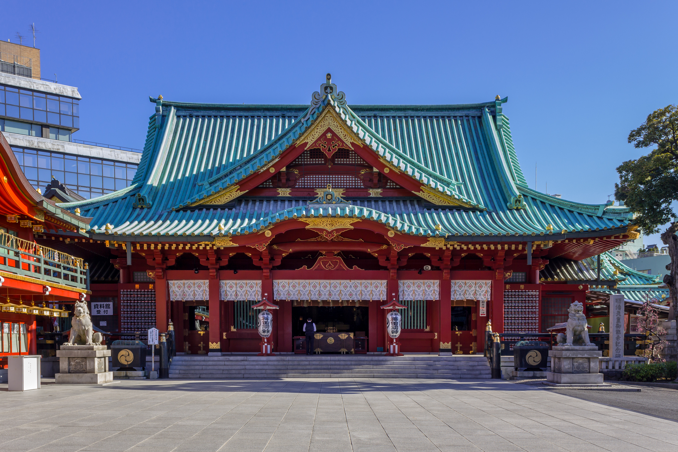 神田明神、御社殿（東京都千代田区）